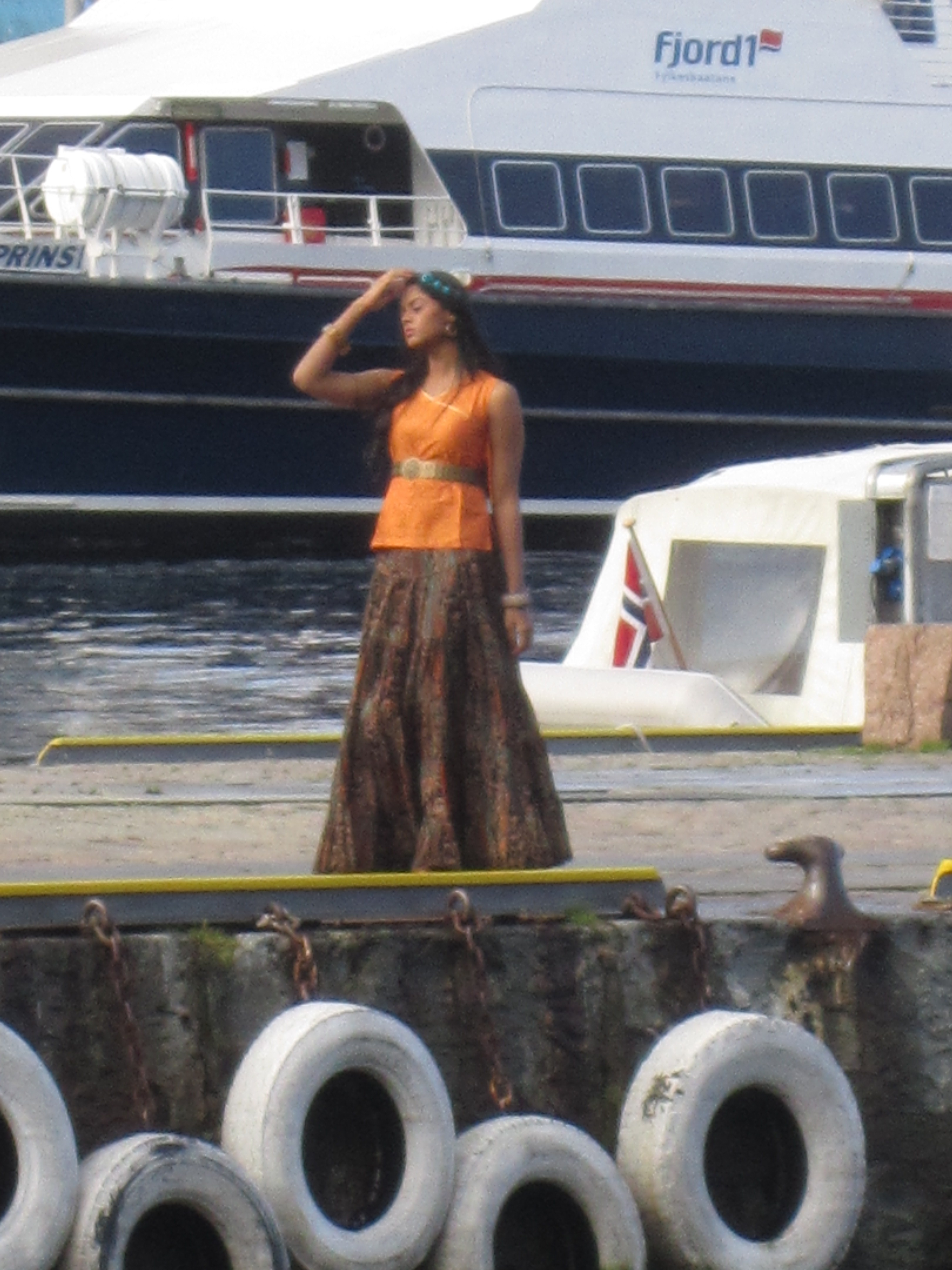 2010 - வெளிநாட்டில் தமிழ் படப்பிடிப்பு, பேர்கன் நகரின் Bryggen இல் 'கோ' படப்பிடிப்பு, நடிகை கார்த்திகா, கப்பலைப் பின்னணியாகக் கொண்டி நிற்கின்றார்.